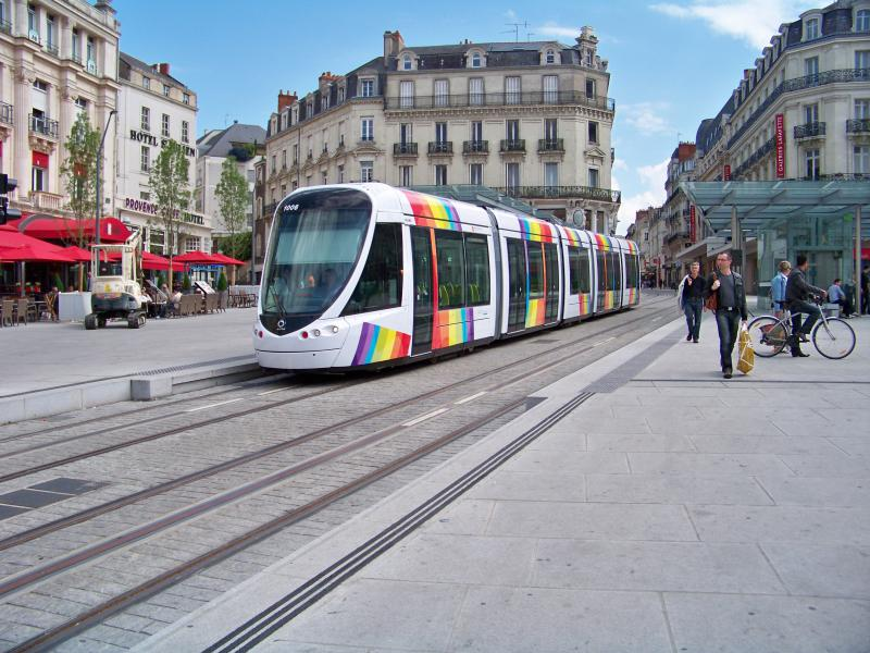 Le tramway en essais Place du Ralliement en mai 2011.